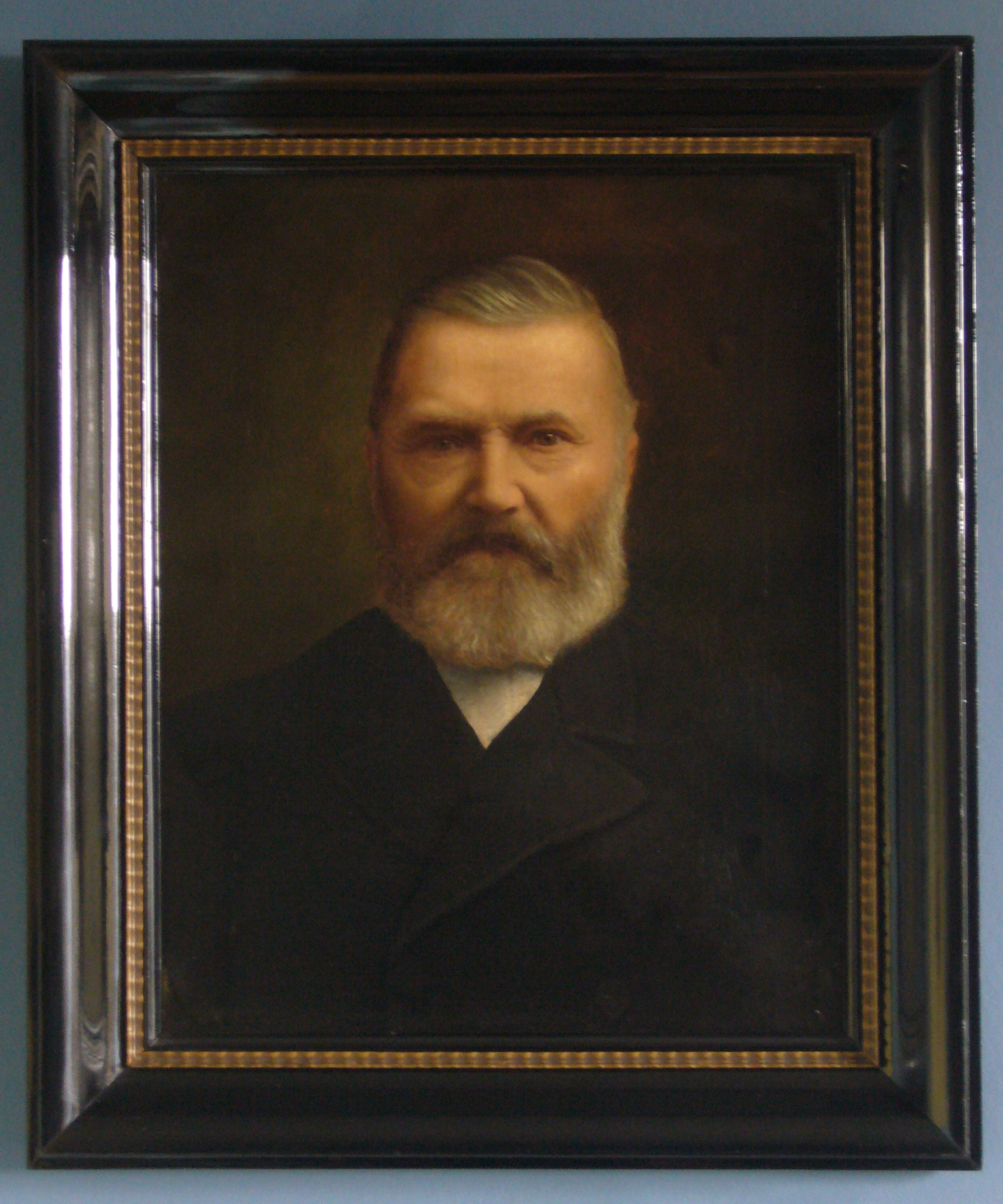 Klaas Pander, oprichter van Pander